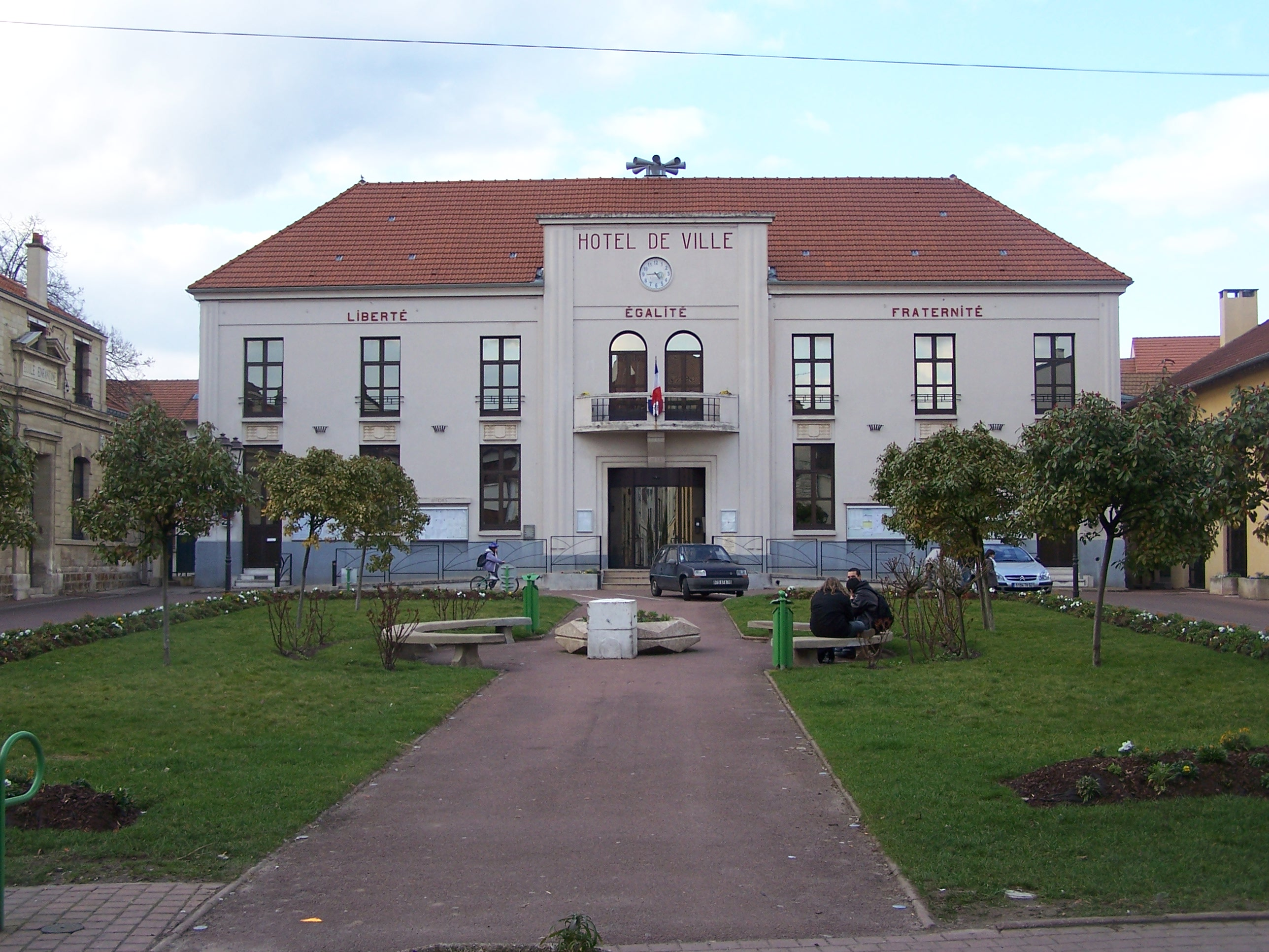 Mairie de Montesson, Yvelines, France